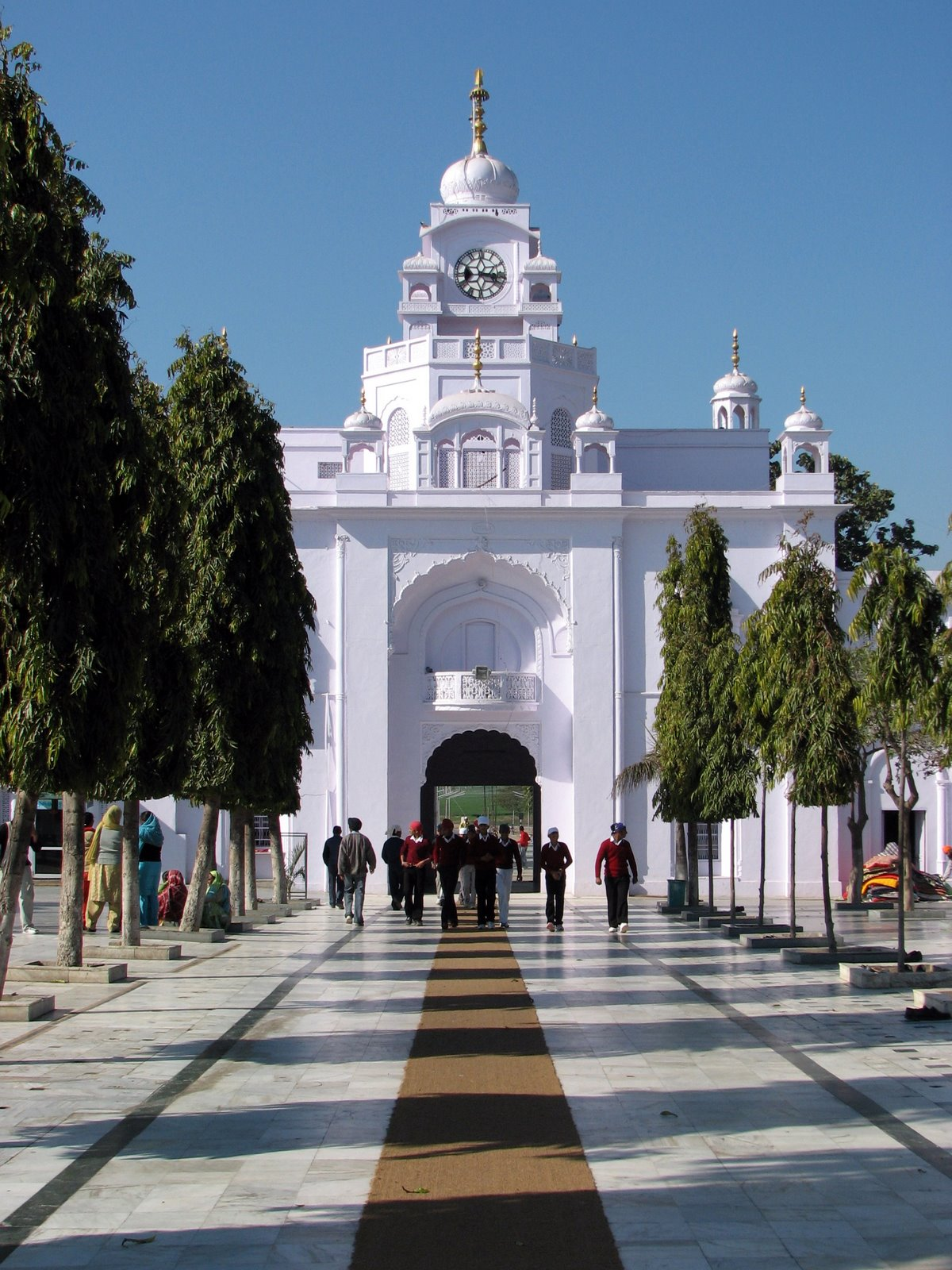 Fatehgarh Sahib, Punjab, India